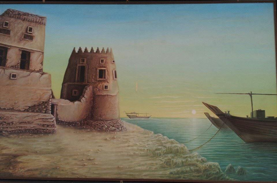 لوحة فنية لقلعة الفيحاني في دارين بريشة الفنان التاروتي الأستاذ عبدالعظيم شلي. اللوحة الأصل معلقة في مستوصف جمعية تاروت الخيرية